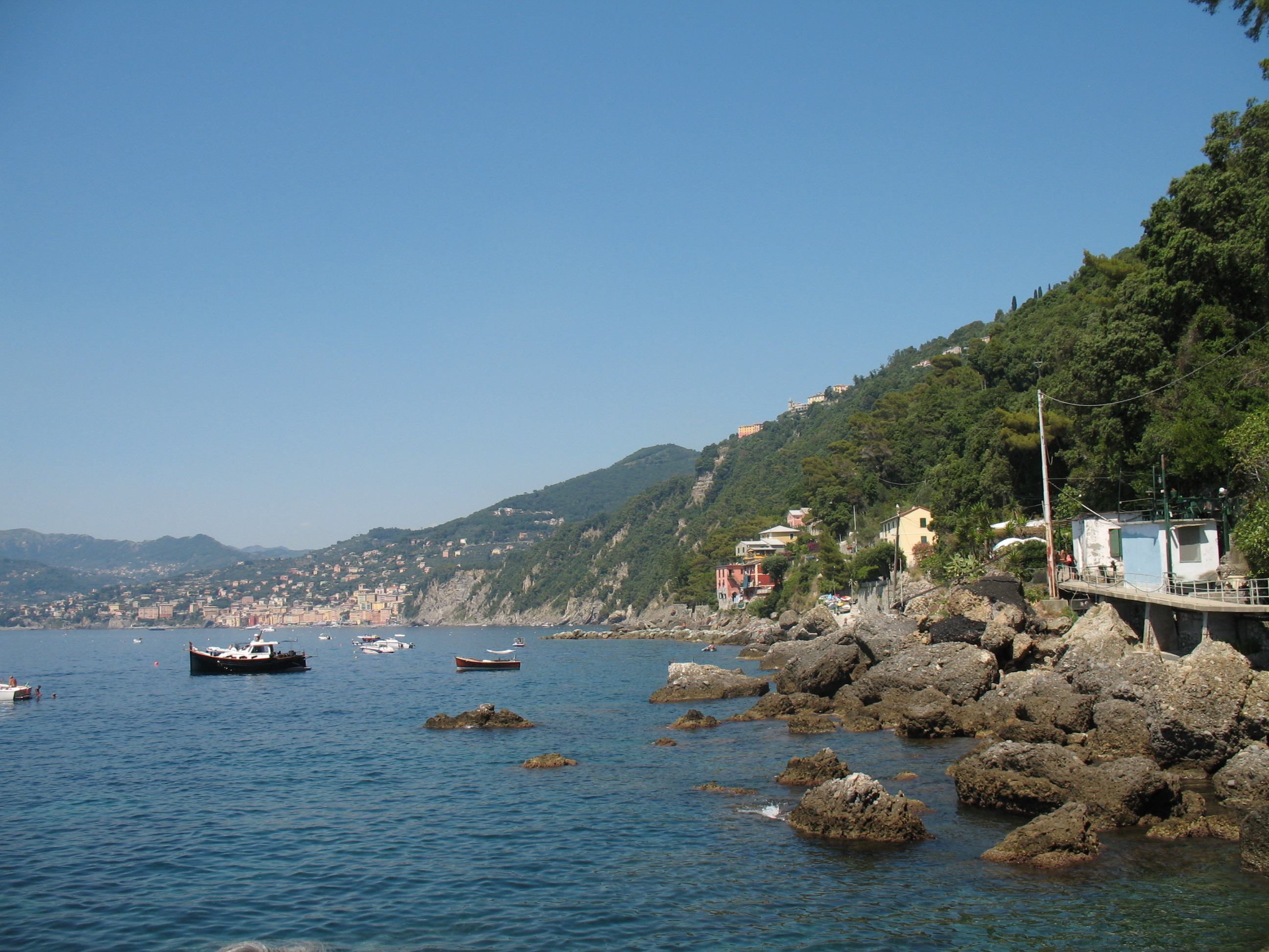 Camogli